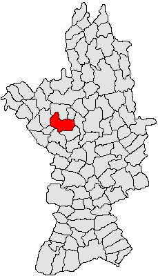 Categorie:Hărţi ale judeţului Olt